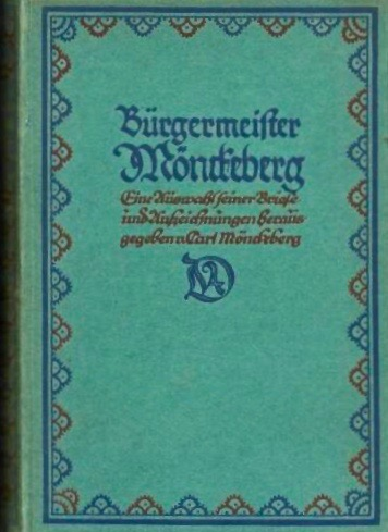 Carl Adolf Mönckeberg: Bürgermeister Mönckeberg. Eine Auswahl seiner Briefe und Aufzeichnungen. Deutsche Verlagsanstalt, Stuttgart und Berlin 1918. OCLC 786436367